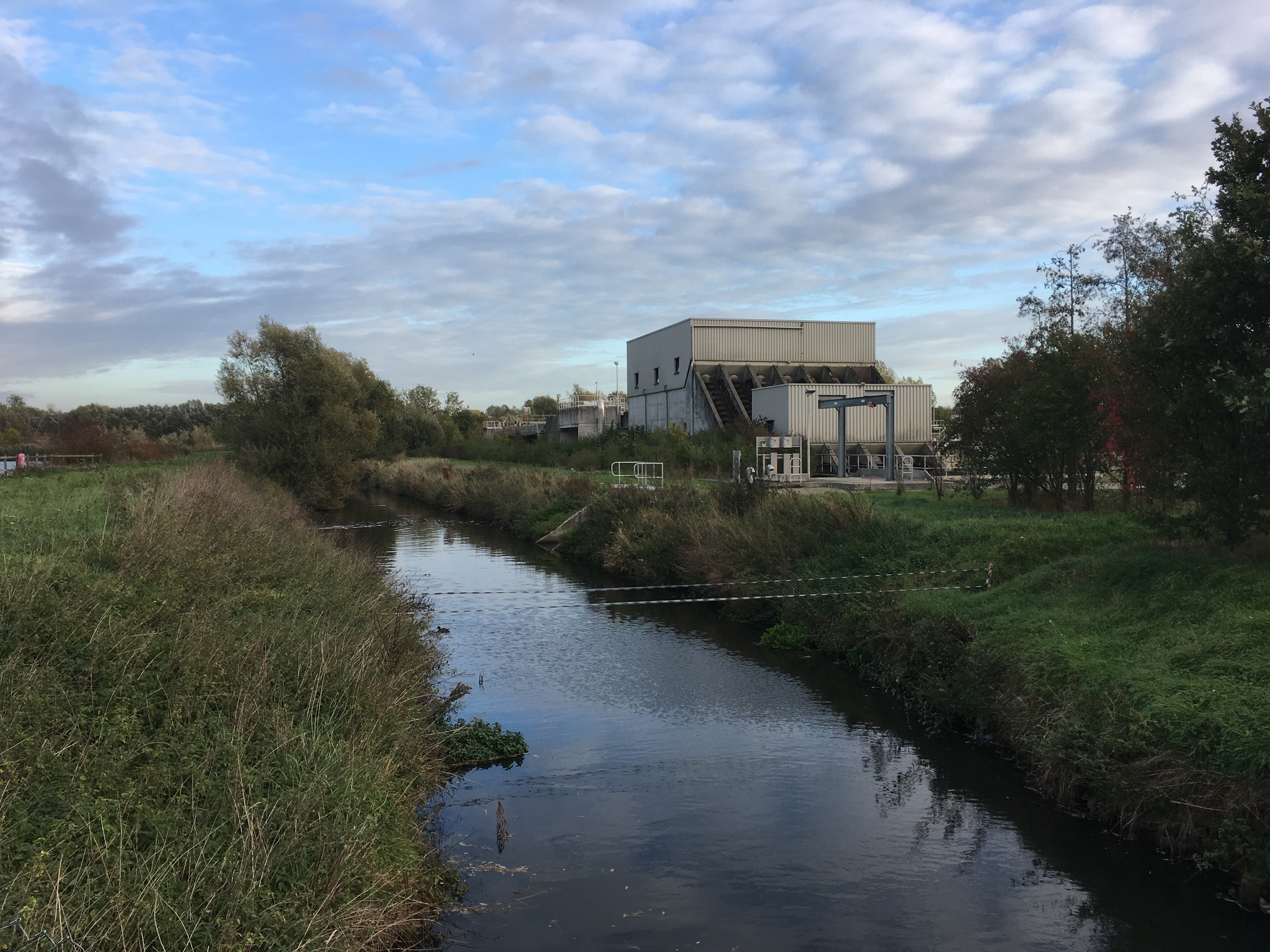 Bellebeek naast de rioolwaterzuiveringsinstallatie van Aquafin bij Liedekerke (België)